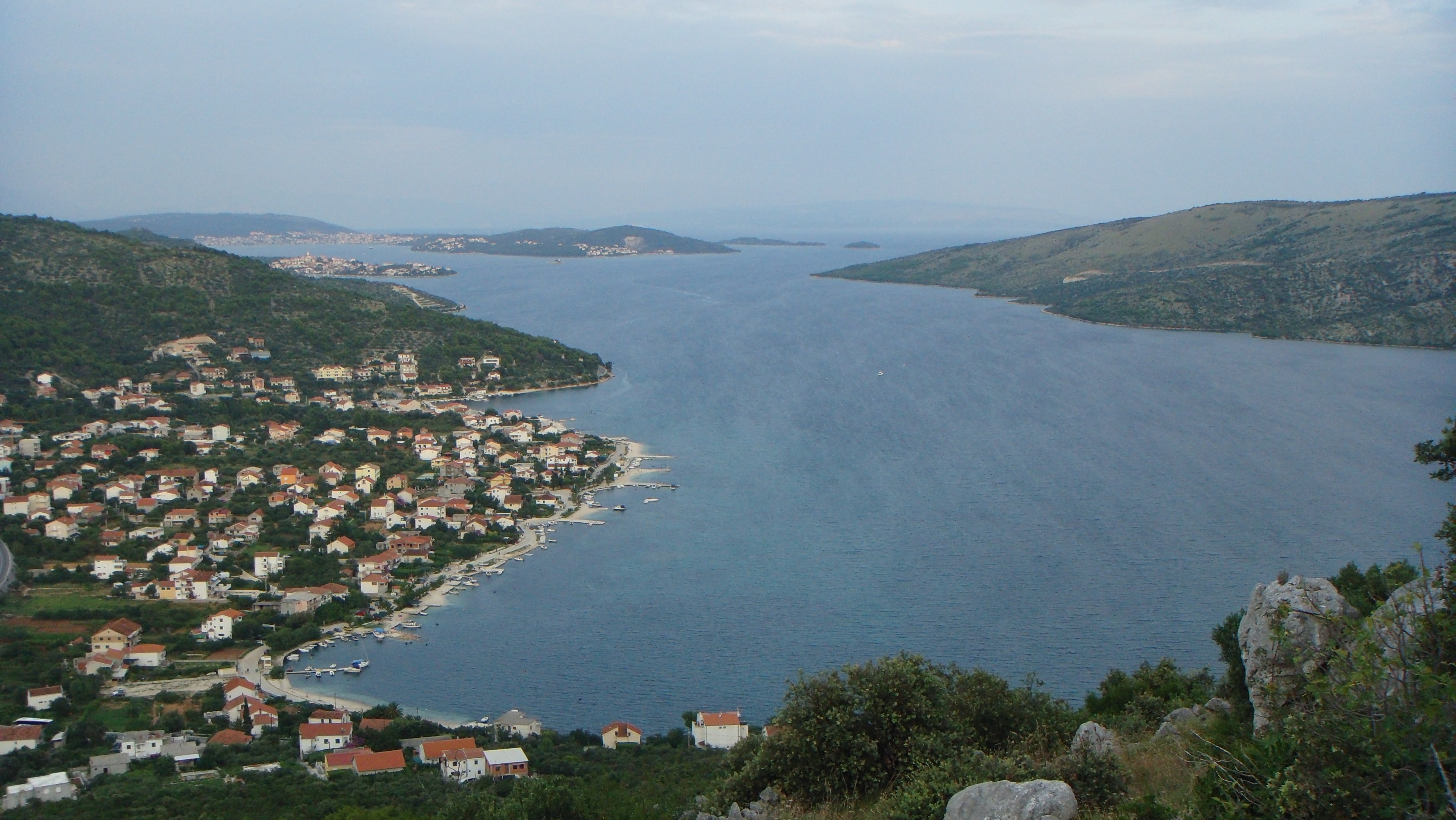 Marina, Croatia